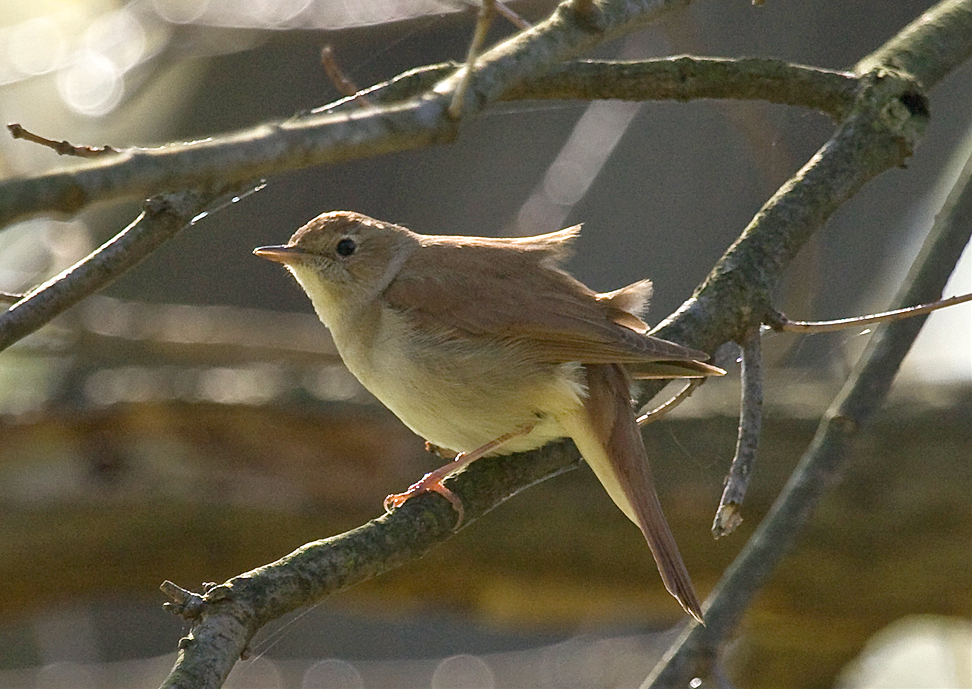 Nachtigall (Luscinia megarhynchos)